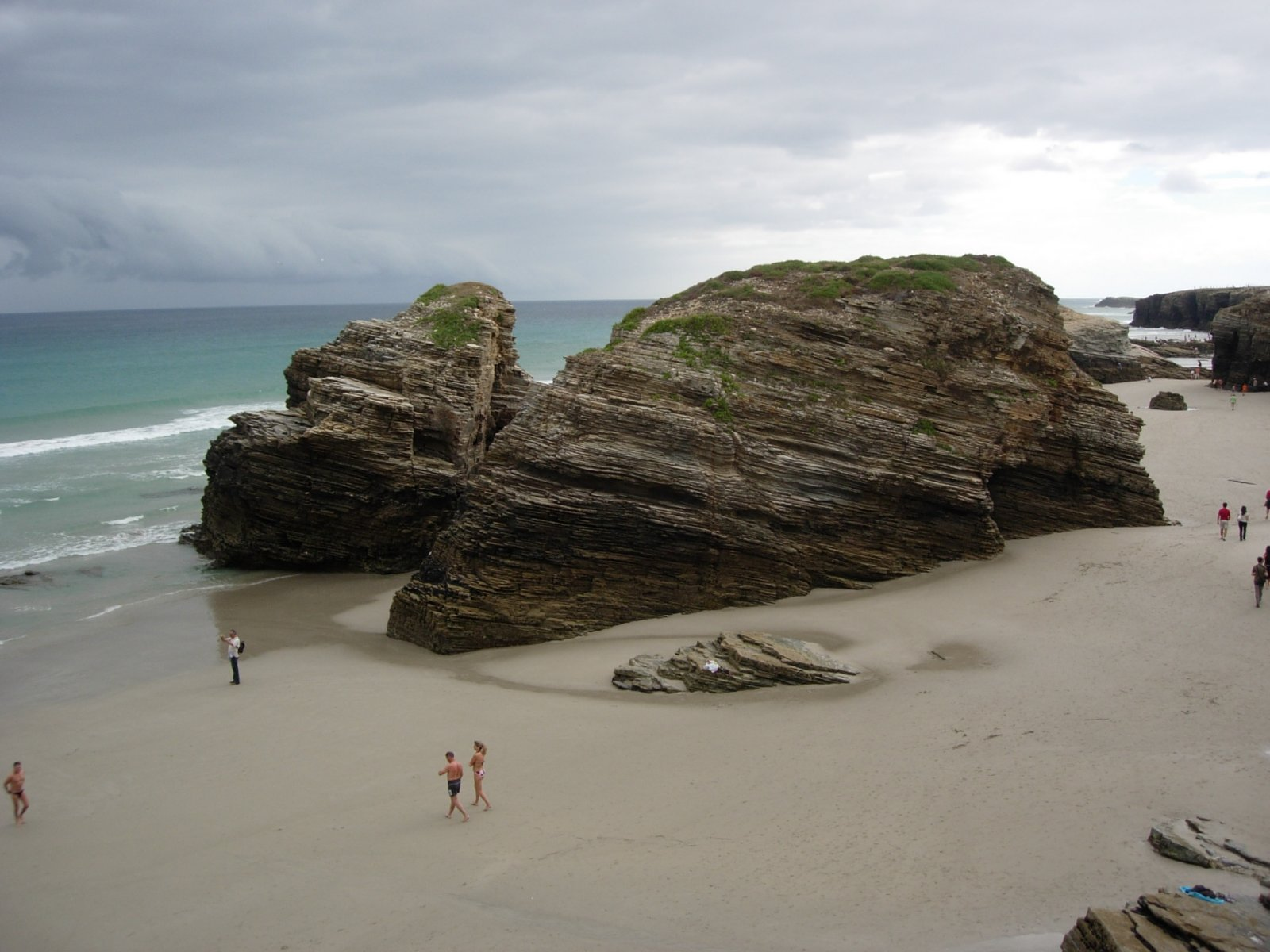 A Praia das Catedrais (Ribadeo) Licensing Categoría:Imaxes de Ribadeo